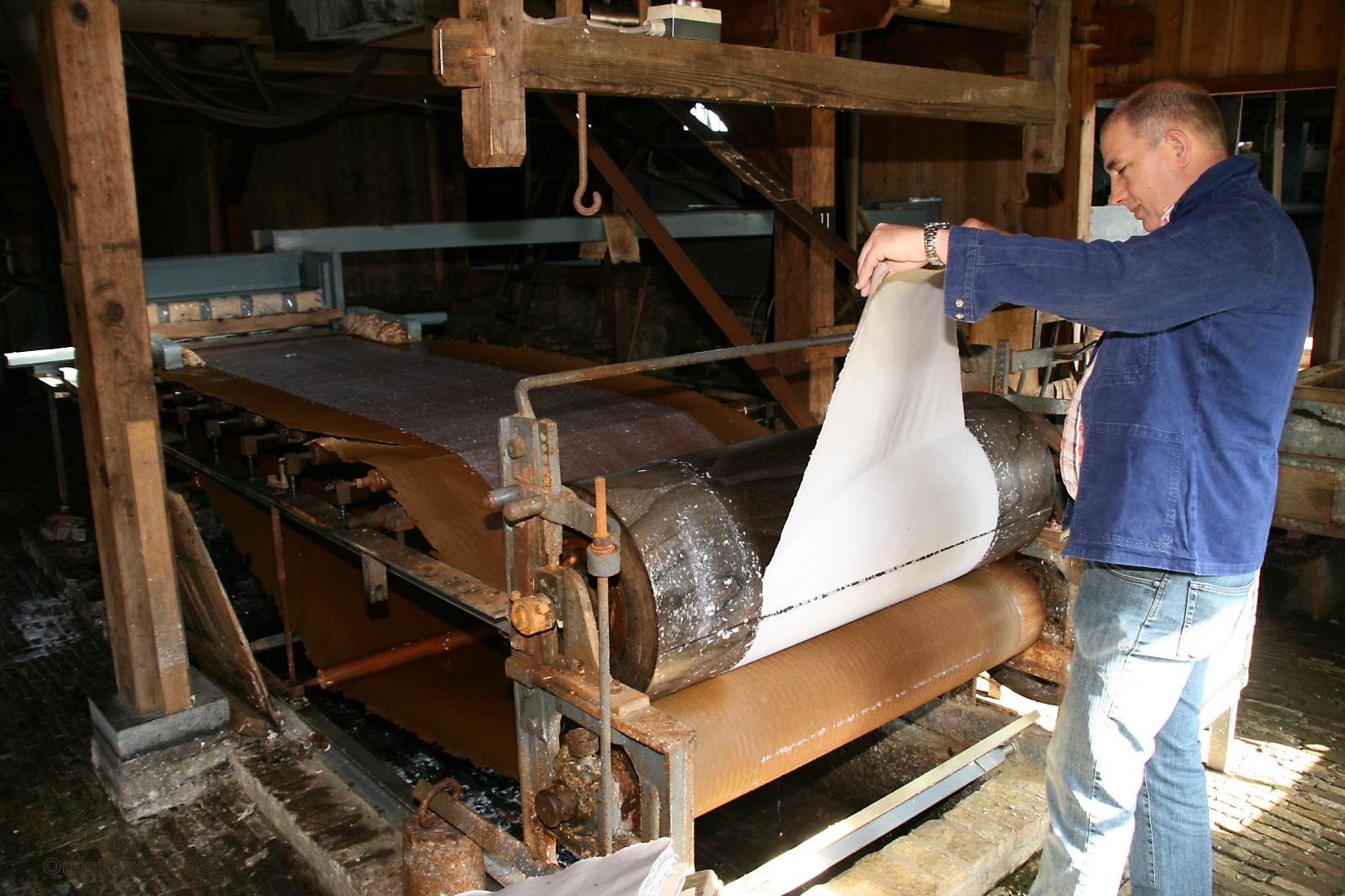 Westzaan: papiermolen De Schoolmeester - papiermachine